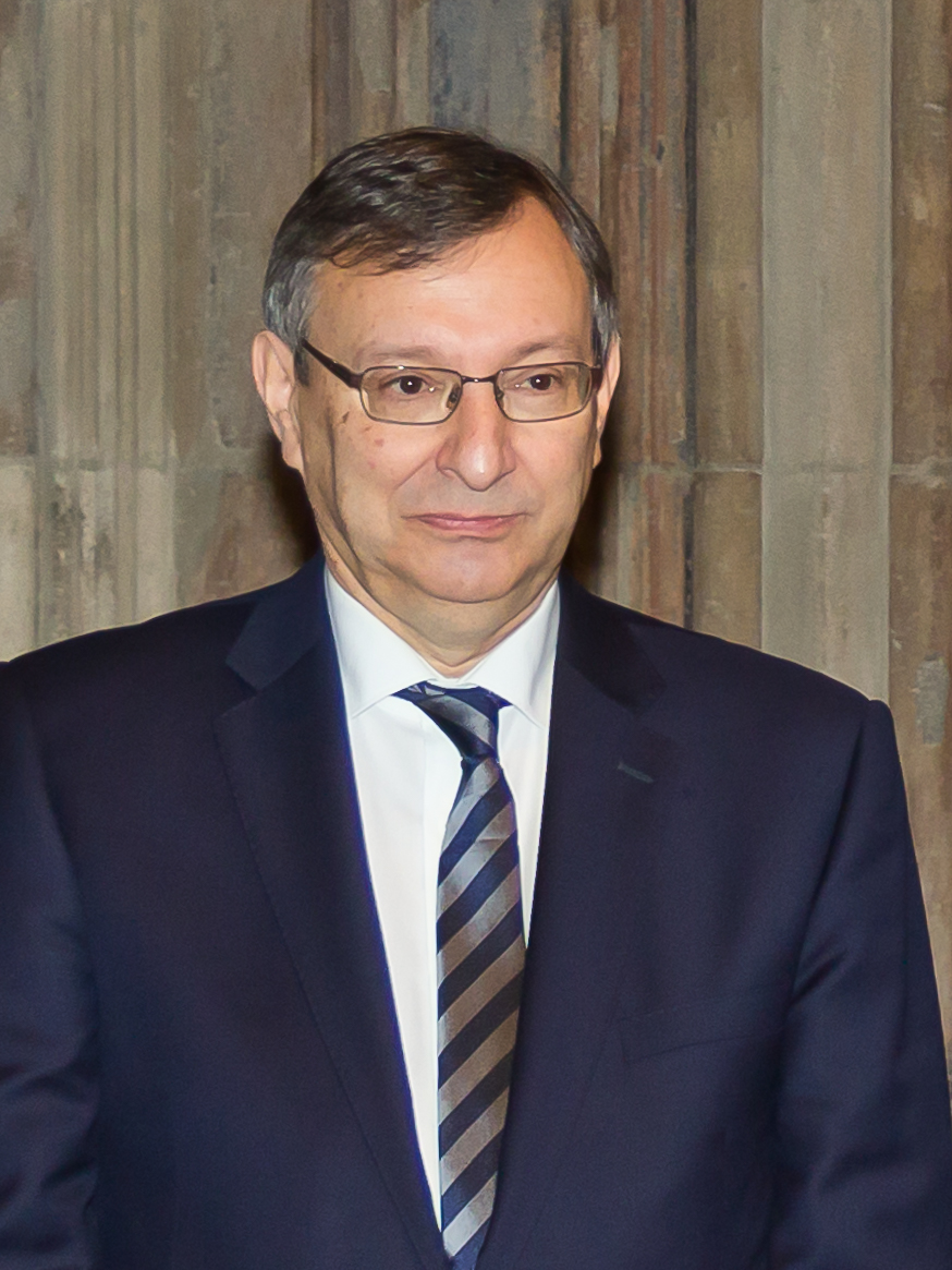 Empfang 60 Jahre Mission des Staates Israel im Rathaus Köln Foto: Abraham Lehrer, Vorstandsmitglied der Synagogen-Gemeinde Köln